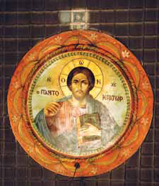 Изображение на Исус Христос Вседържител на тавана на църквата "Свети Атанасий" в Тумба, Кукушко, Гърция.